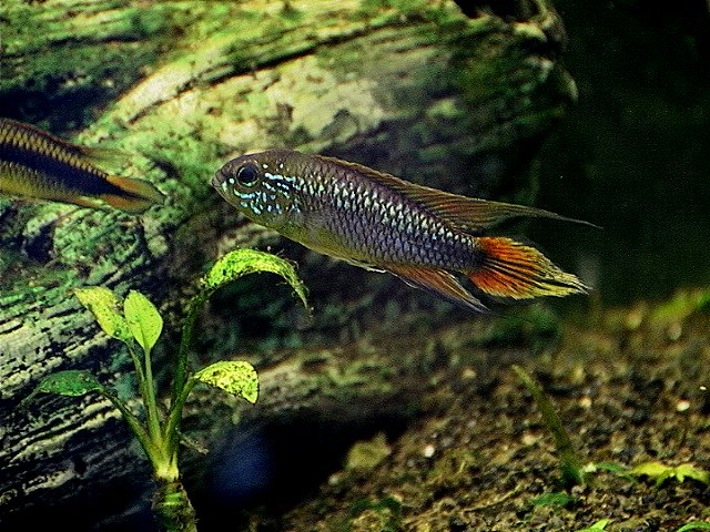 Apistogramma agassizii